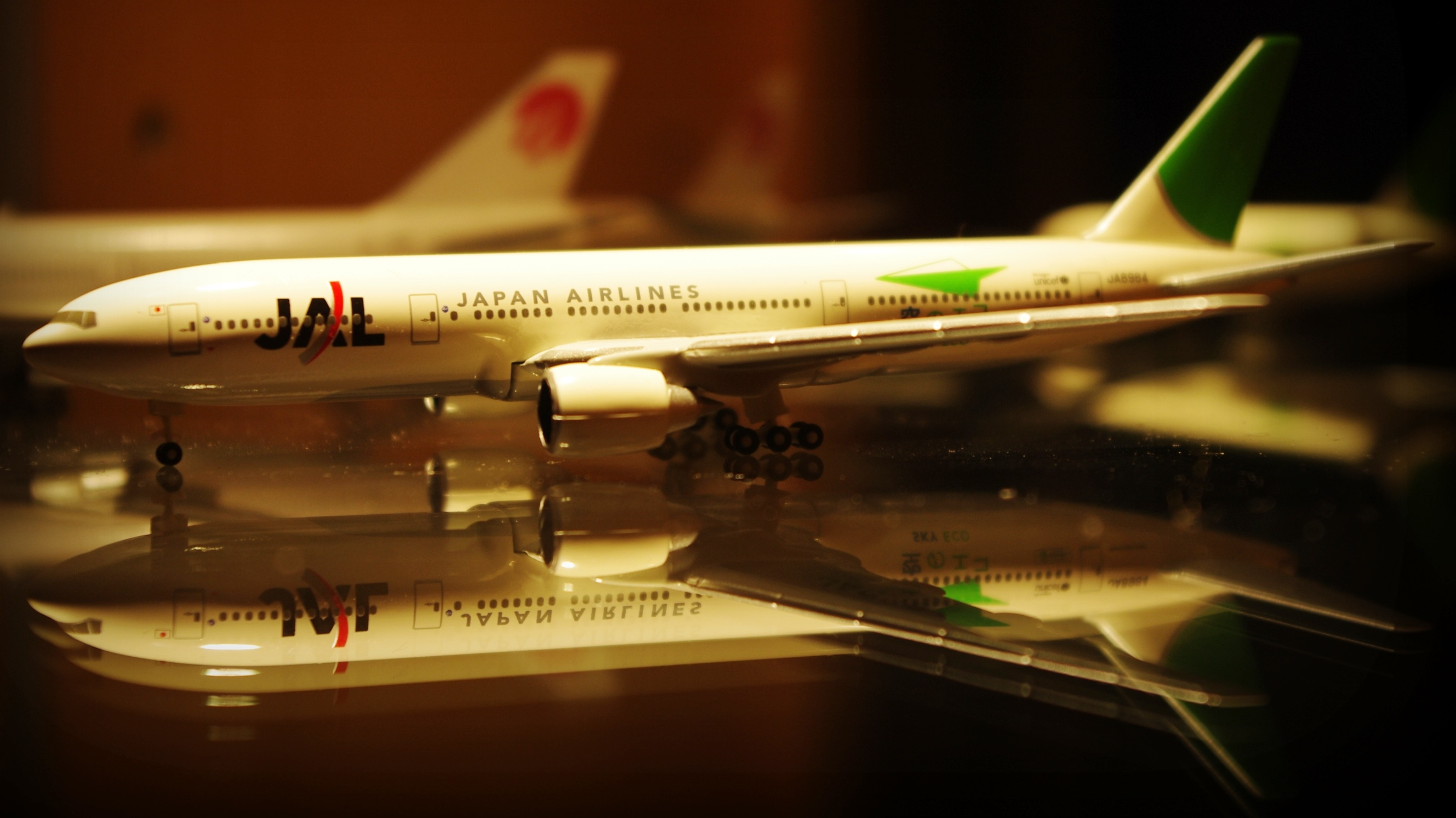 Boeing 777-246 JA8984